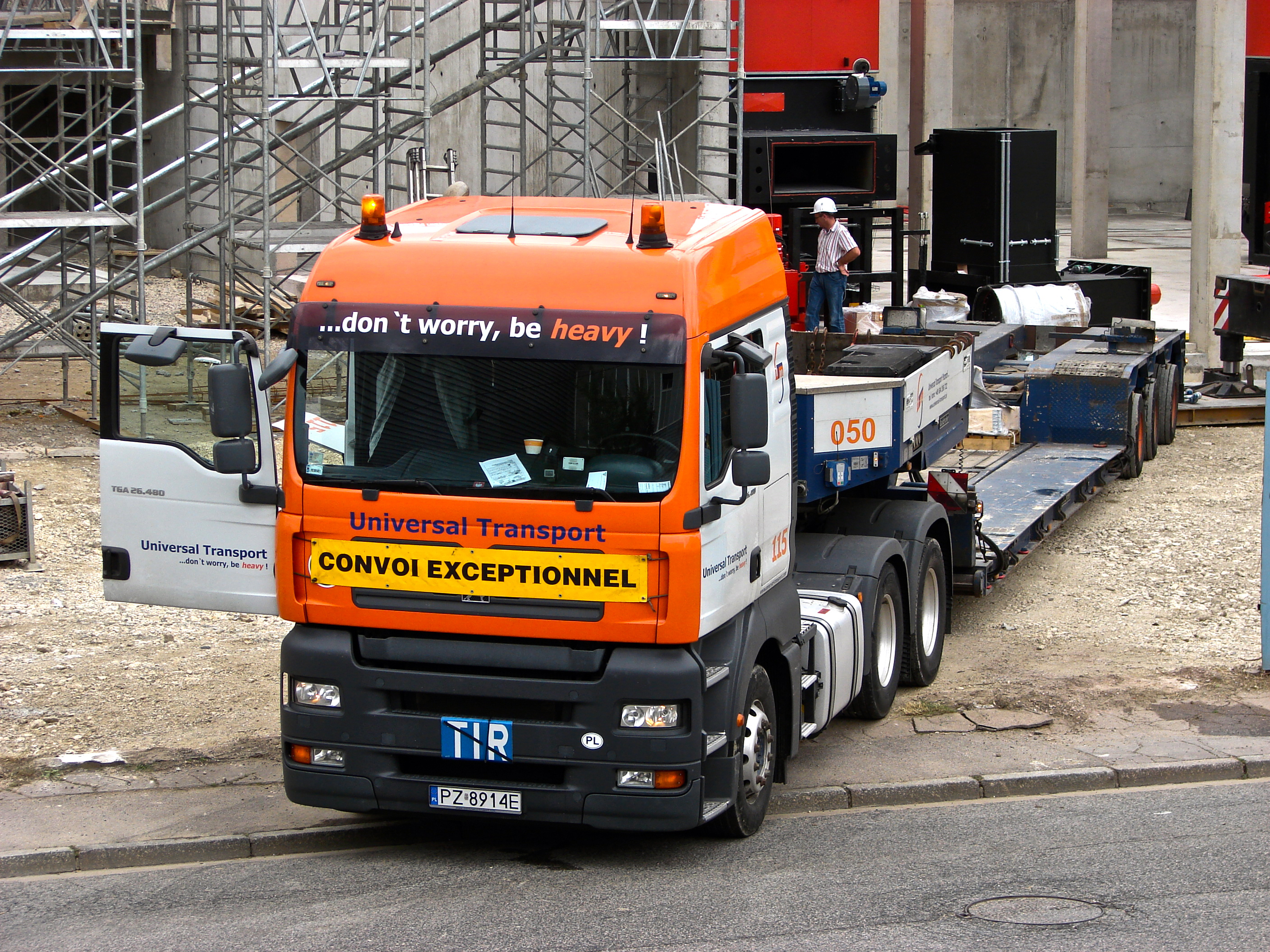 Construction de la nouvelle chaufferie urbaine mixte Biomasse/FOD de Nancy. Ce bâtiment propose un jeu de volumes bois et béton recouvert de terrasses végétalisées. Hauteur : 13 m au toit, 31 m à la cheminée SHON : 91 m2 Architecte : Bernt-Morillon-Thouveny Liebherr 245EC-H : Longueur flèche : 60 m Charge maxi : 12 t Hauteur sous crochet : 36 m